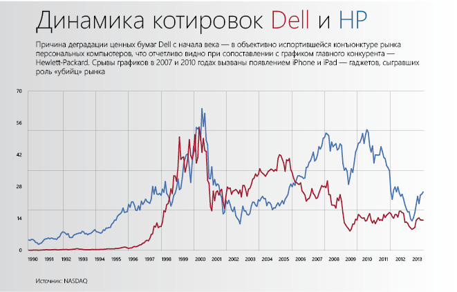 Динамика котировок Dell и HP (1990-2013)